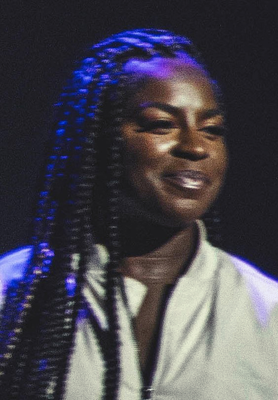 Anna Kendrick/Ester Dean